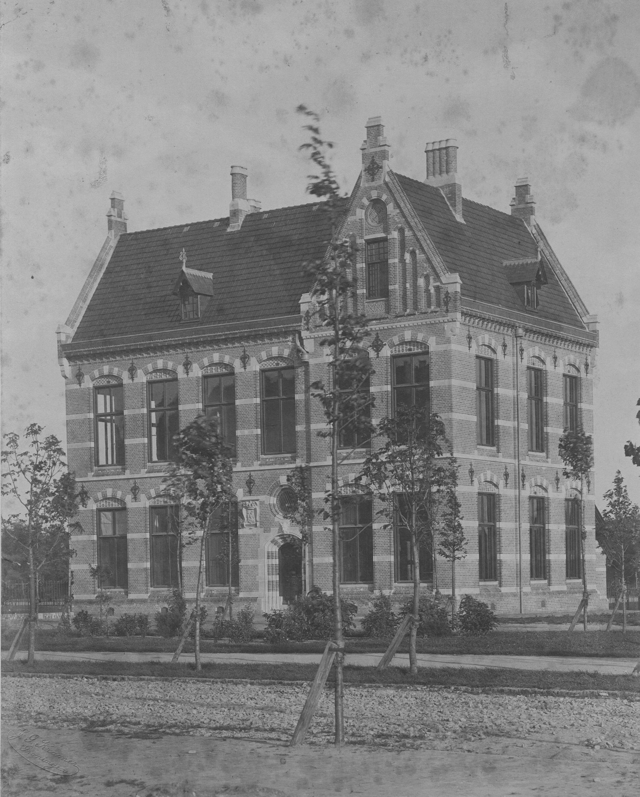 Gezicht op het gebouw van Hypotheek en Kadaster aan de Uboo Emmiussingel. In 1945 verwoest bij bevrijding van Groningen. Nu locatie Minervaflat (Ubbo Emmiussingel 64).